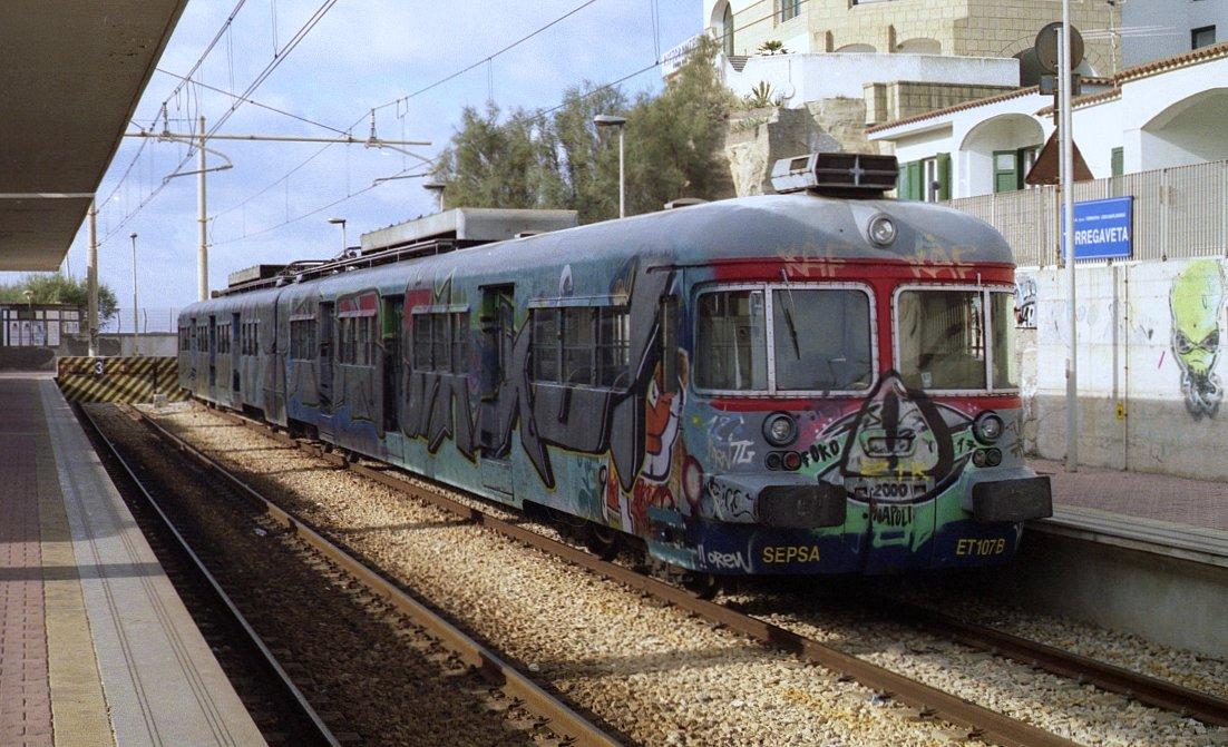 Elettrotreno ET 107 della SEPSA in sosta a Torregaveta